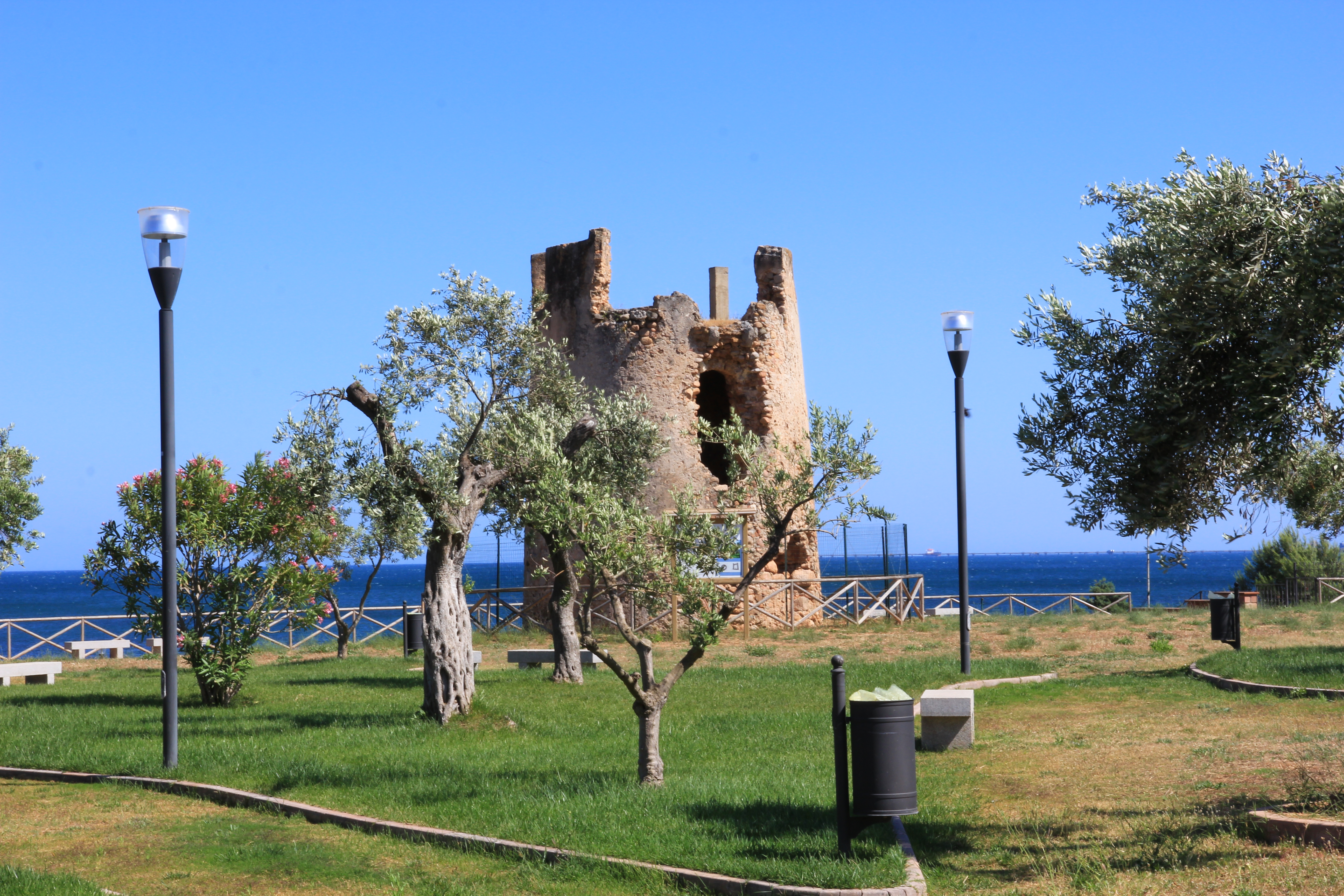 Capoterra - Torre di Su Loi